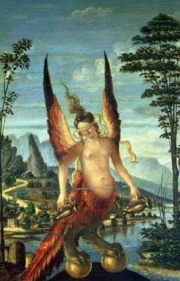 Allégorie de la Fortune ailée